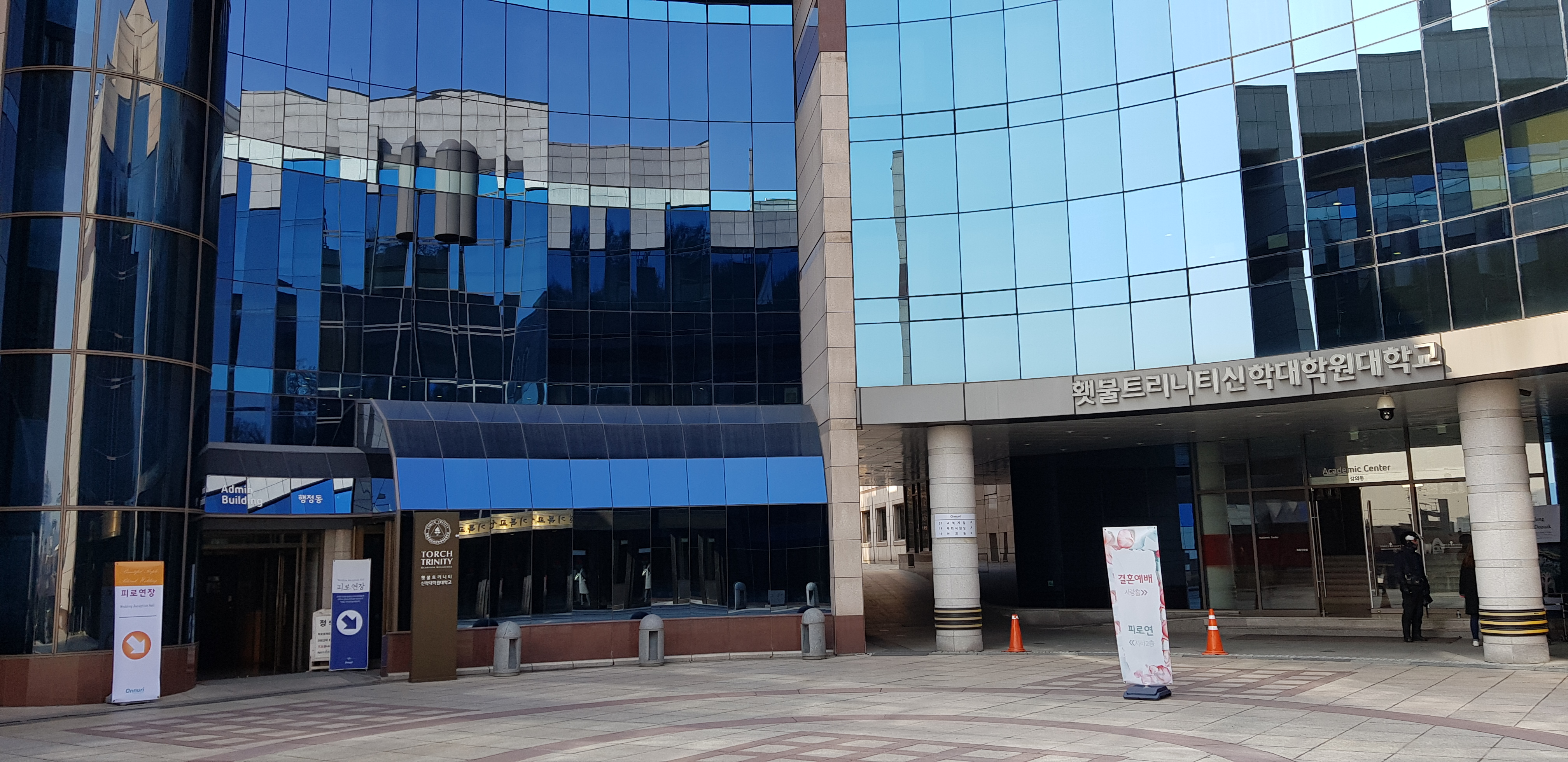 횟불신학대학원대학교 정문